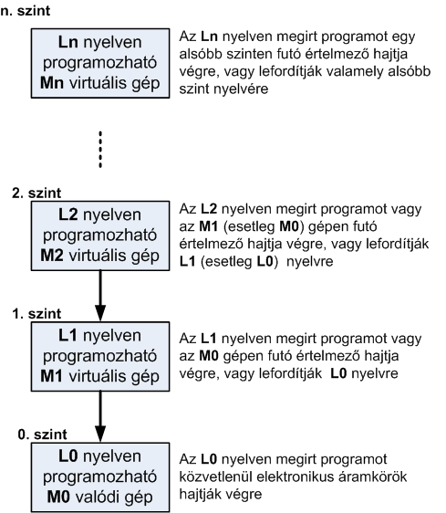 Többszintű gép